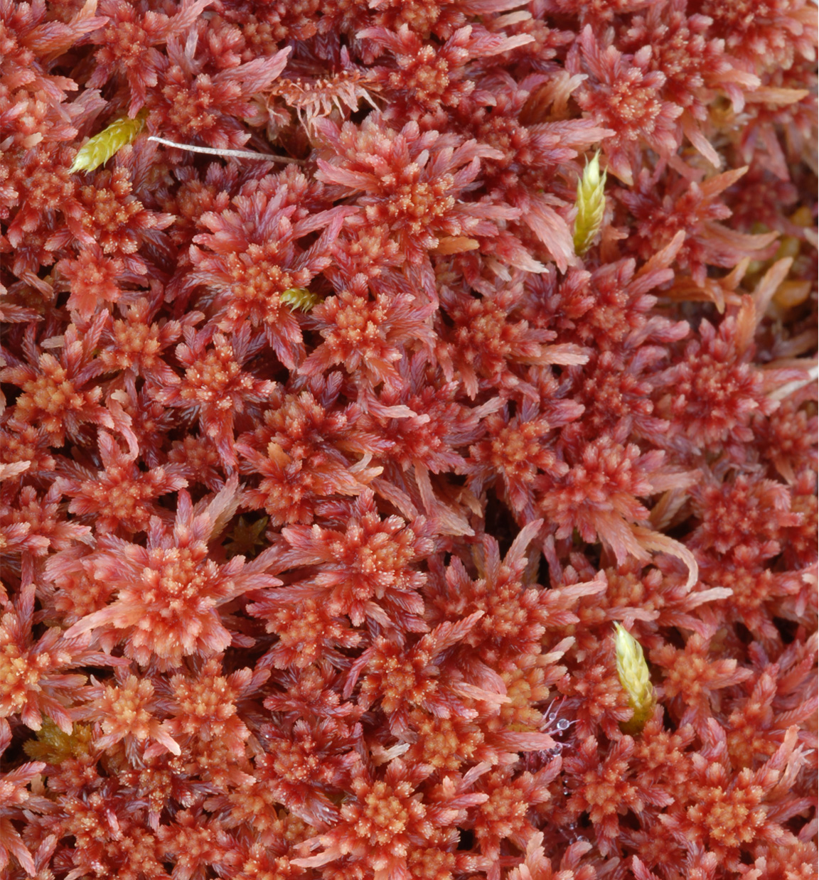 Torvmosen raudtorvmose (Sphagnum rubellum)